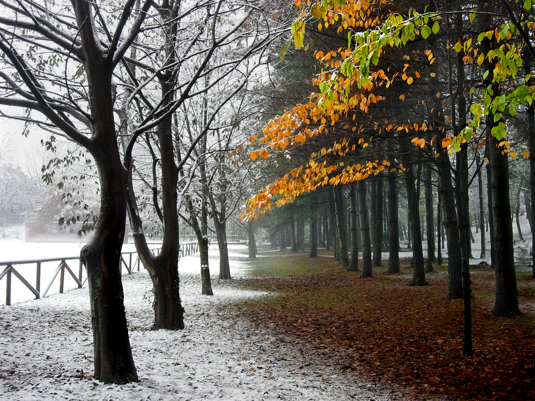 Bosco di Legnano (Parco Castello) This is a photo of a monument which is part of cultural heritage of Italy.